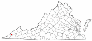 va maps